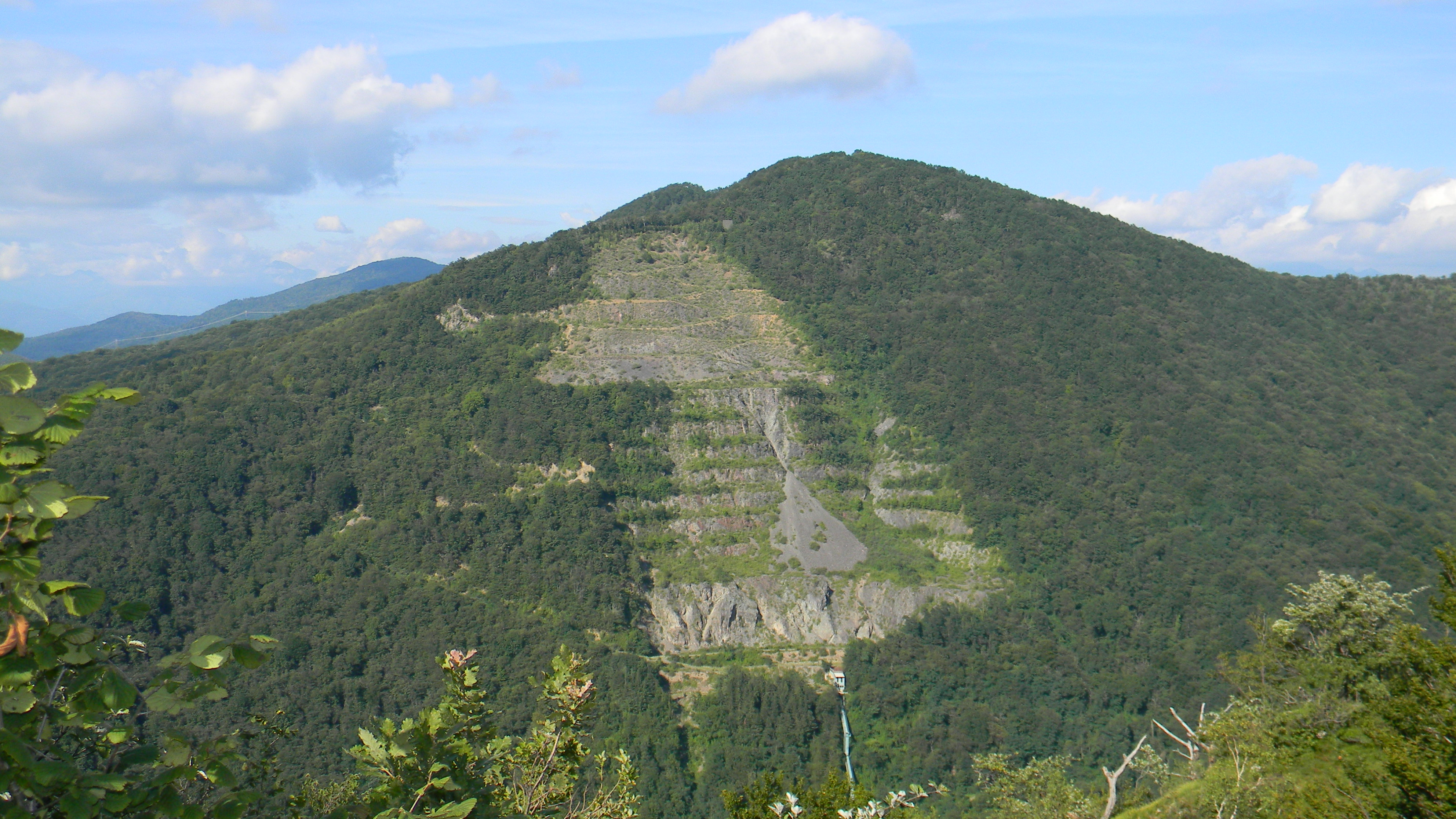 La cava di porfido sita sul monte Martica, tra i comuni di Brinzio e Varese (Lombardia - Italia)